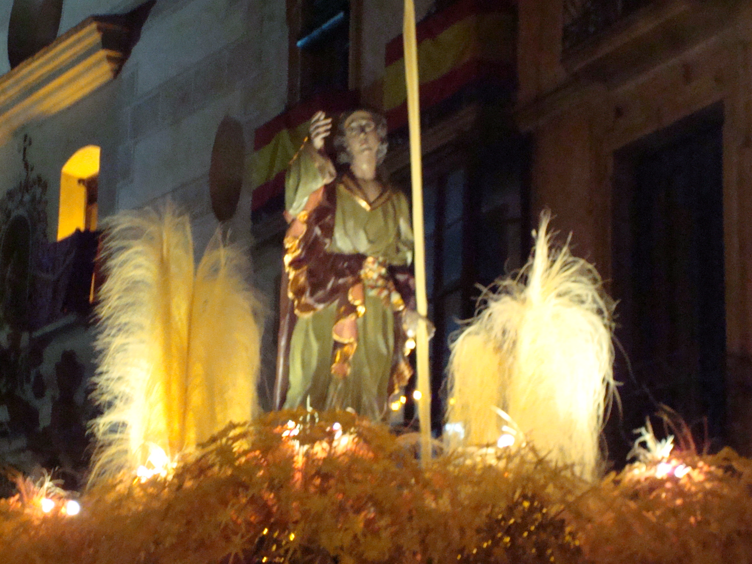 La talla de San Juan a la salida de Santo Domingo, Semana Santa de Lorca